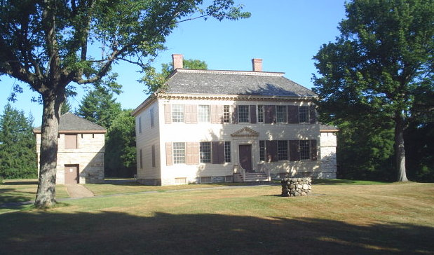 M3367S-4504